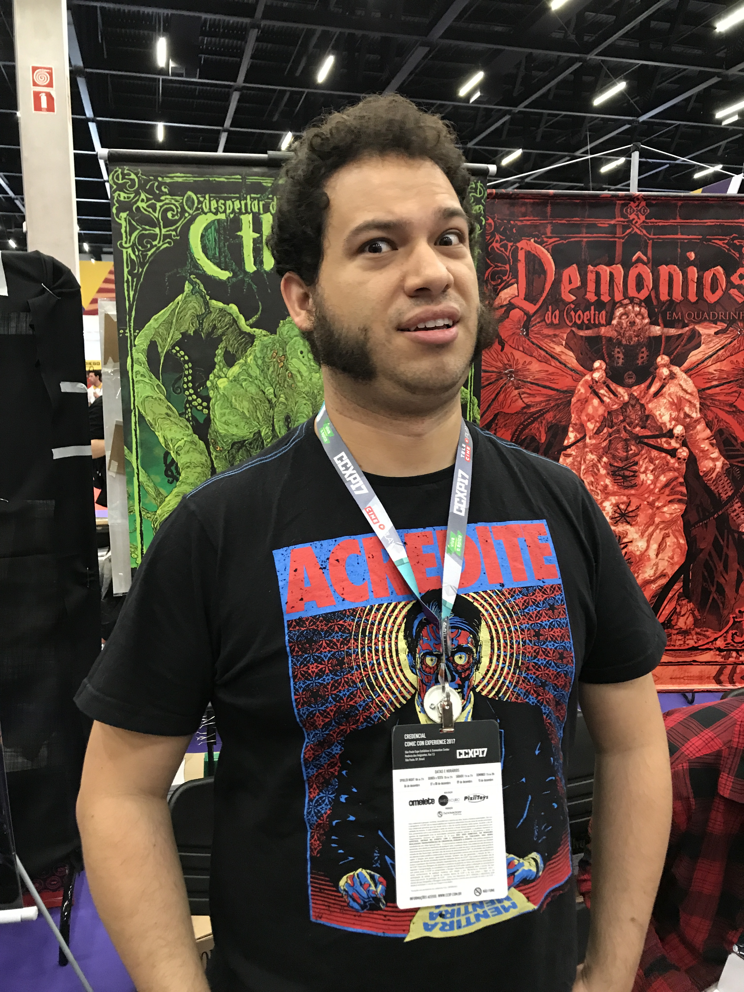 Artista Raphael Fernandes na edição de 2017 da Comic Con Experience